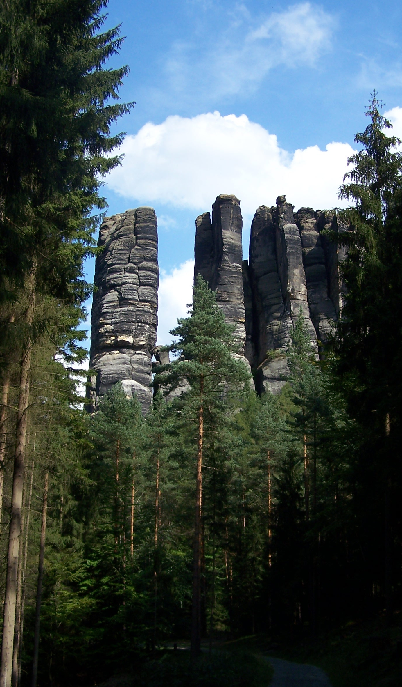 Bloßstock, Kreuzturm und Morsche Zinne vom Unteren Affensteinweg aus